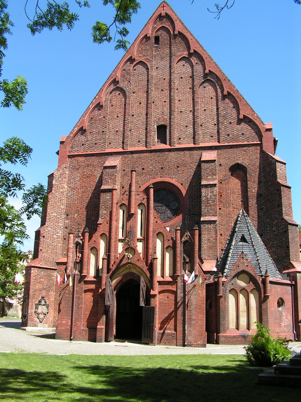 Kościół pod wezwaniem Św. Anny w Ząbkowicach Śląskich - autor zdjęcia Andrzej Berdowicz